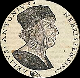 Retrato de Antonio de Nebrija, extraído de la portada del "Dictionarium" en la edición impresa en Granada en 1536 sus hijos. Xilografía atribuida a Antonio Ramiro, natural de Écija, grabador principal de la imprenta de los hijos de Nebrija